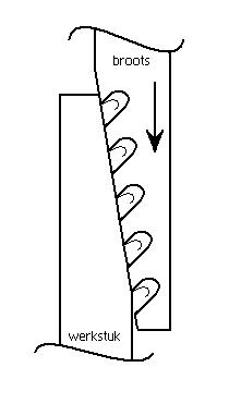 Trekfrezen of brootsen is een verspaningstechniek waarbij het gereedschap, dat meerdere snijkanten heeft, de snijbeweging uitvoert. zelf gemaakte afbeelding door: Pieter van der Veer